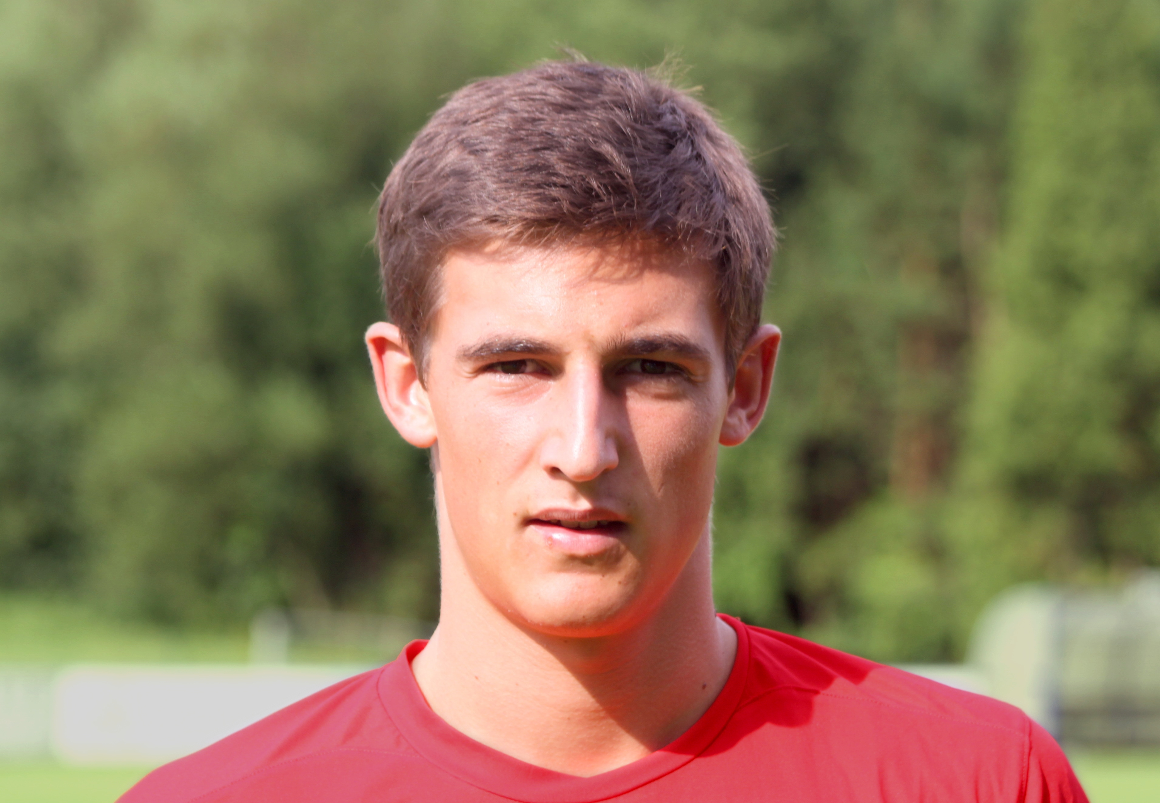 Thomas Piermayr (LASK Linz) - Österreichische U-21-Fußballnationalmannschaft (2)